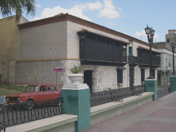 La maison du conquistador Diego Velázquez de Cuéllar - fondateur de la ville - est désormais le Musée d'Art Colonial de Santiago de Cuba.